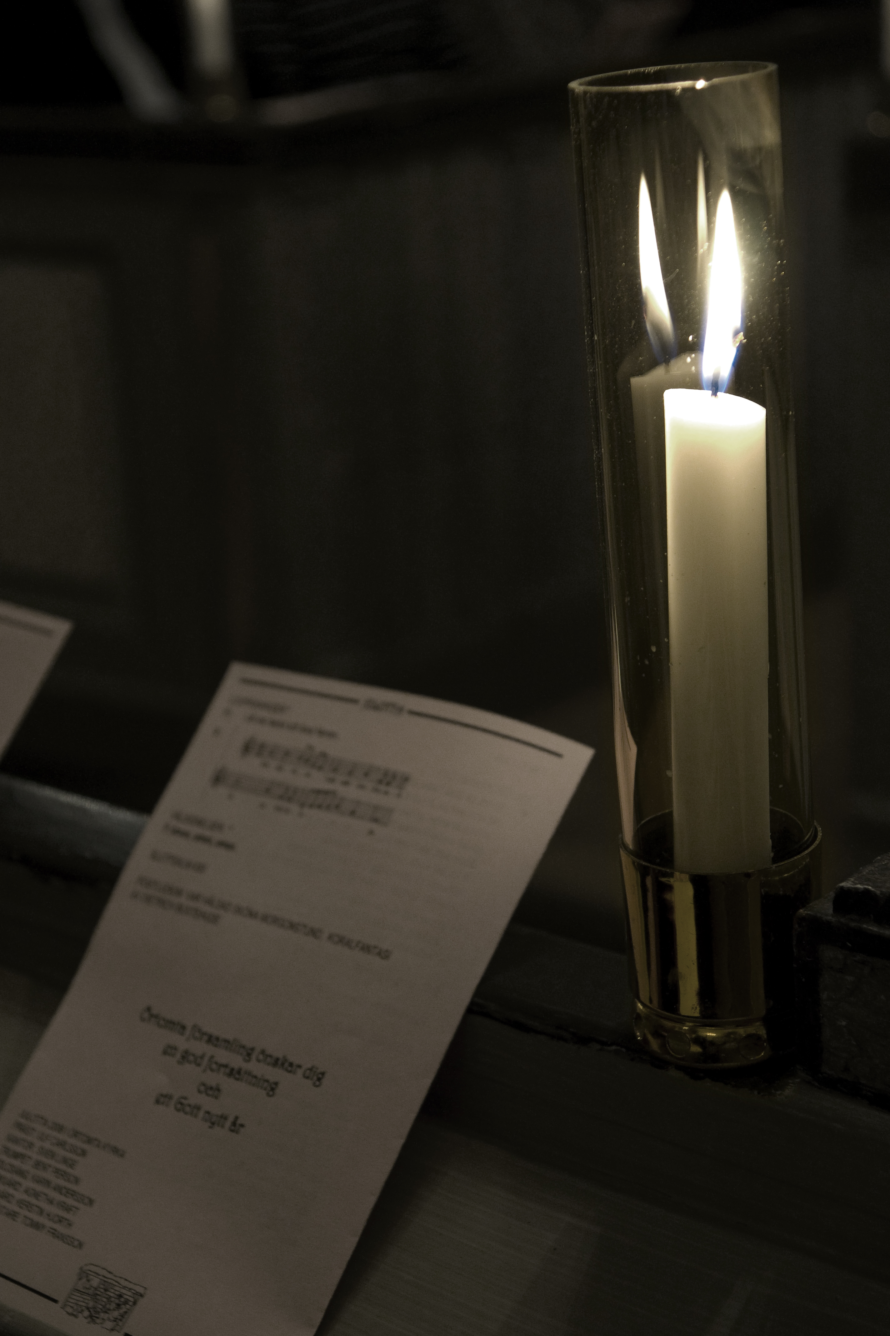 Ljus och infoblad från julotta.